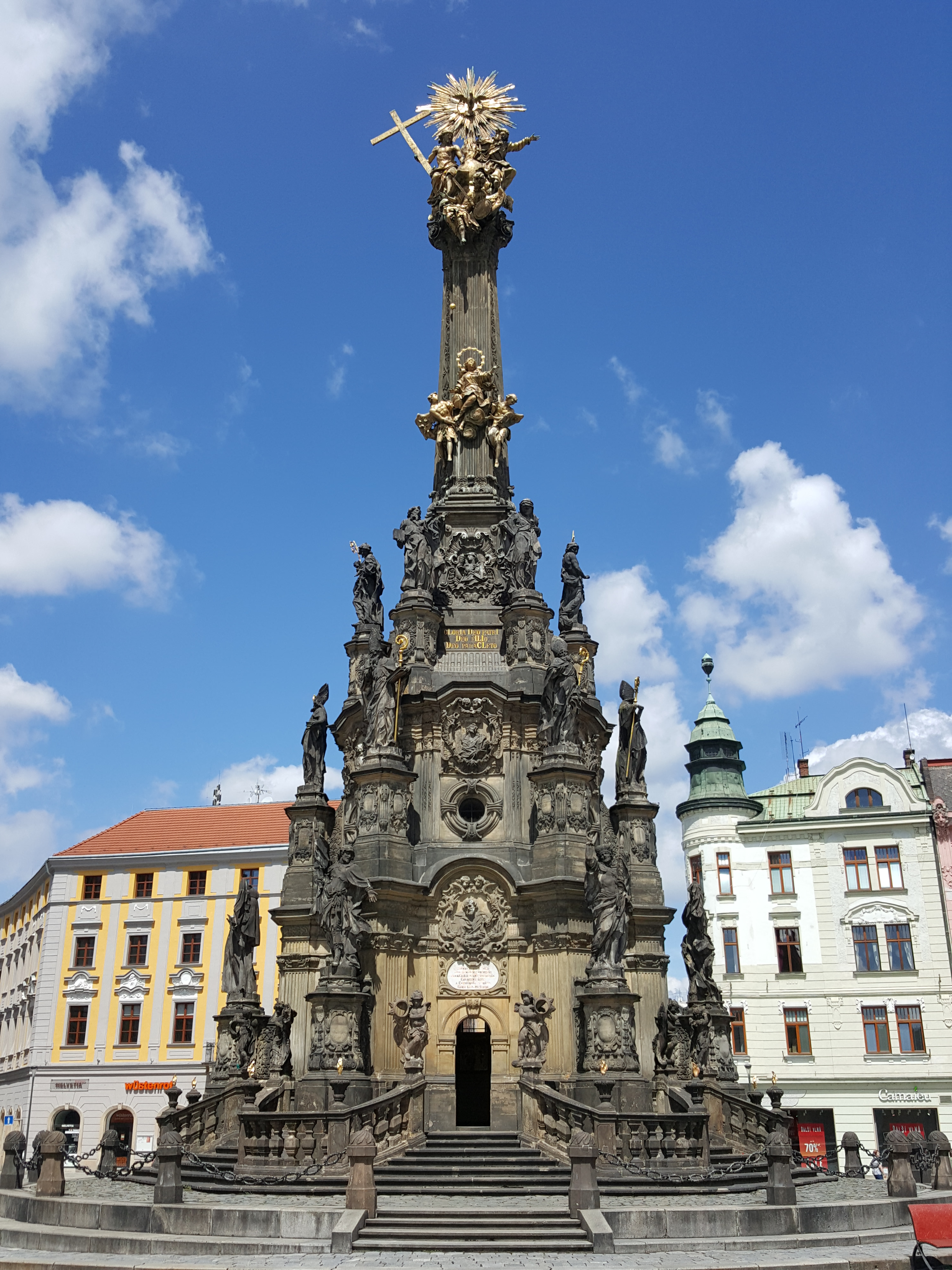 Sloup Nejsvětější Trojice, 1716–1754, Václav Render, Filip Sattler, Ondřej Zahner, Šimon Forstner a další, Olomouc